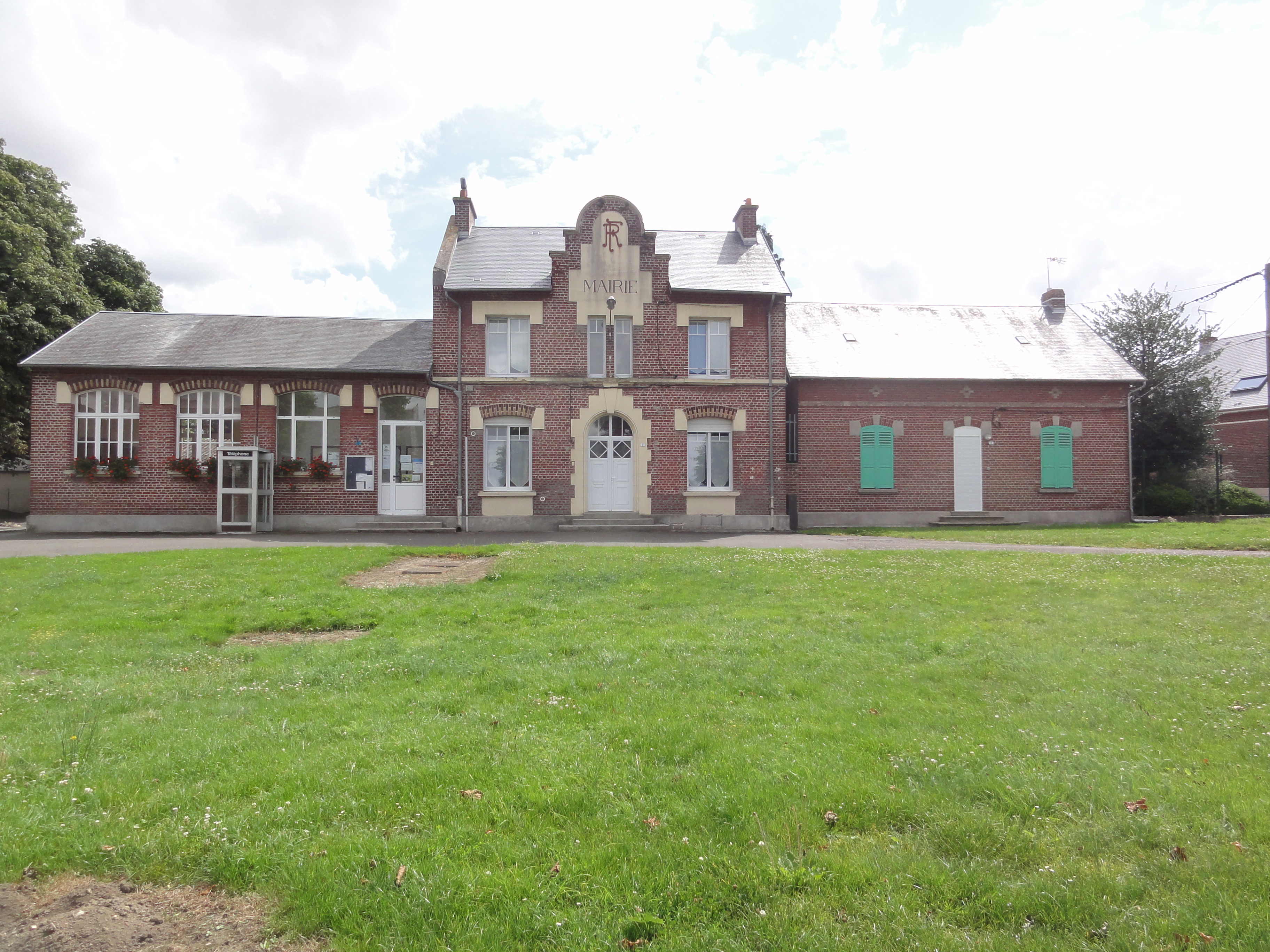 Douchy (Aisne) mairie